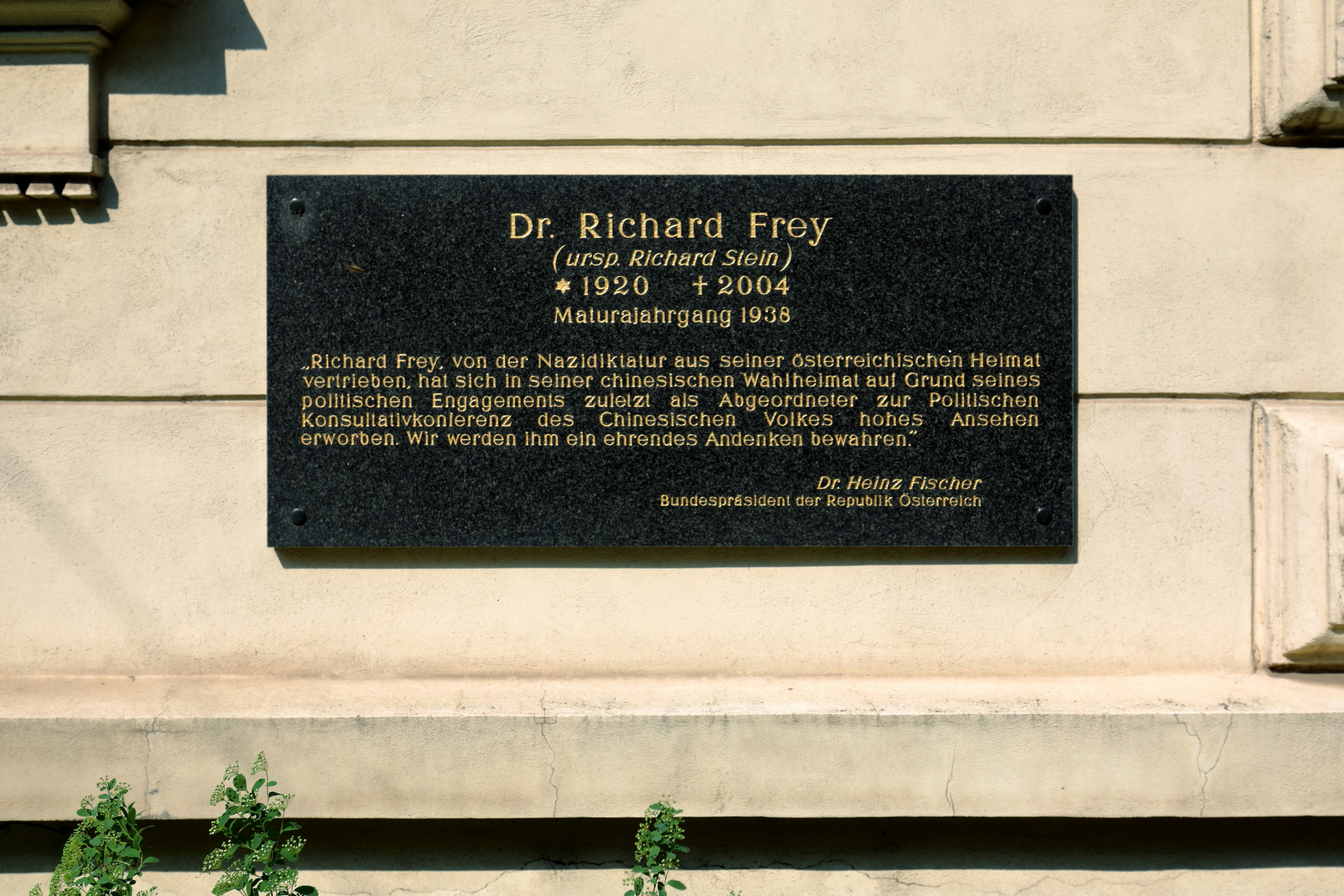 Gedenktafeln beim Döblinger Gymnasium (Gymnasiumstraße 83) im 19. Wiener Gemeindebezirk Döbling. Am 21. Februar 2006 wurde rechtsseitig an der Hauptfassade eine Gedenktafel für das NS-Opfer Richard Frey (eigentlich Richard Stein) enthüllt, deren Text der österreichische Bundespräsident Heinz Fischer verfasste.